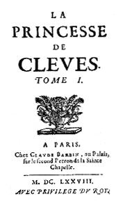 Title page of Marie-Madeleine de la Fayette's La Princesse de Clèves